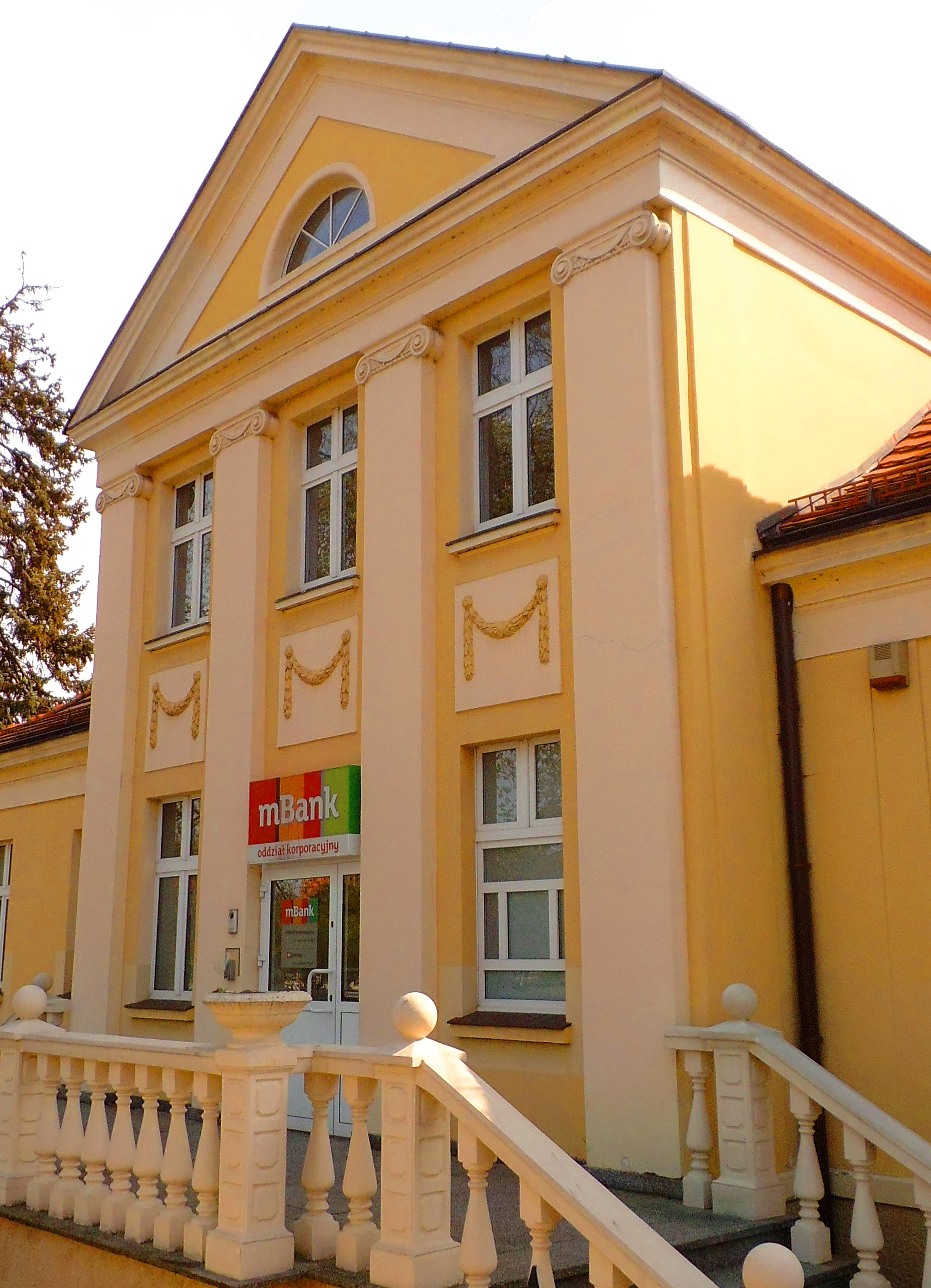 Budynek przy ul. Bydgoskiej 1,3 w Toruniu